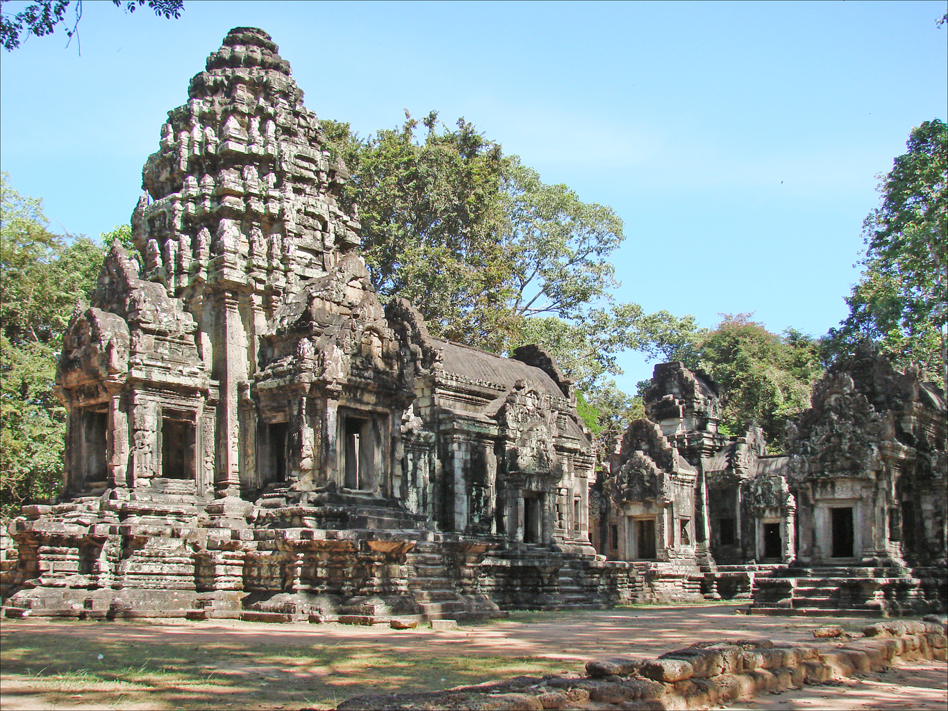 Le sanctuaire et le gopura oriental du temple Thommanon Ce temple a été construit au début du XIIème siècle, sous le règne de Sûryavarman II. Il est dans le style d'Angkor Vat. Il était dédié au culte hindouiste. Il a été restauré par anastylose, dans les années 60, par B-P. Groslier, un archéologue français. Il comprend une partie centrale composée d'une seule tour-sanctuaire reliée par un passage à une pièce plus grande appelée mandapa. Certains linteaux et frontons sont finement sculptés, les murs sont ornés de gardiens de porte (dvârapâla) et de divinités féminines (devatâ). L'enceinte est percée de deux gopuras donnant à l'est et à l'ouest.